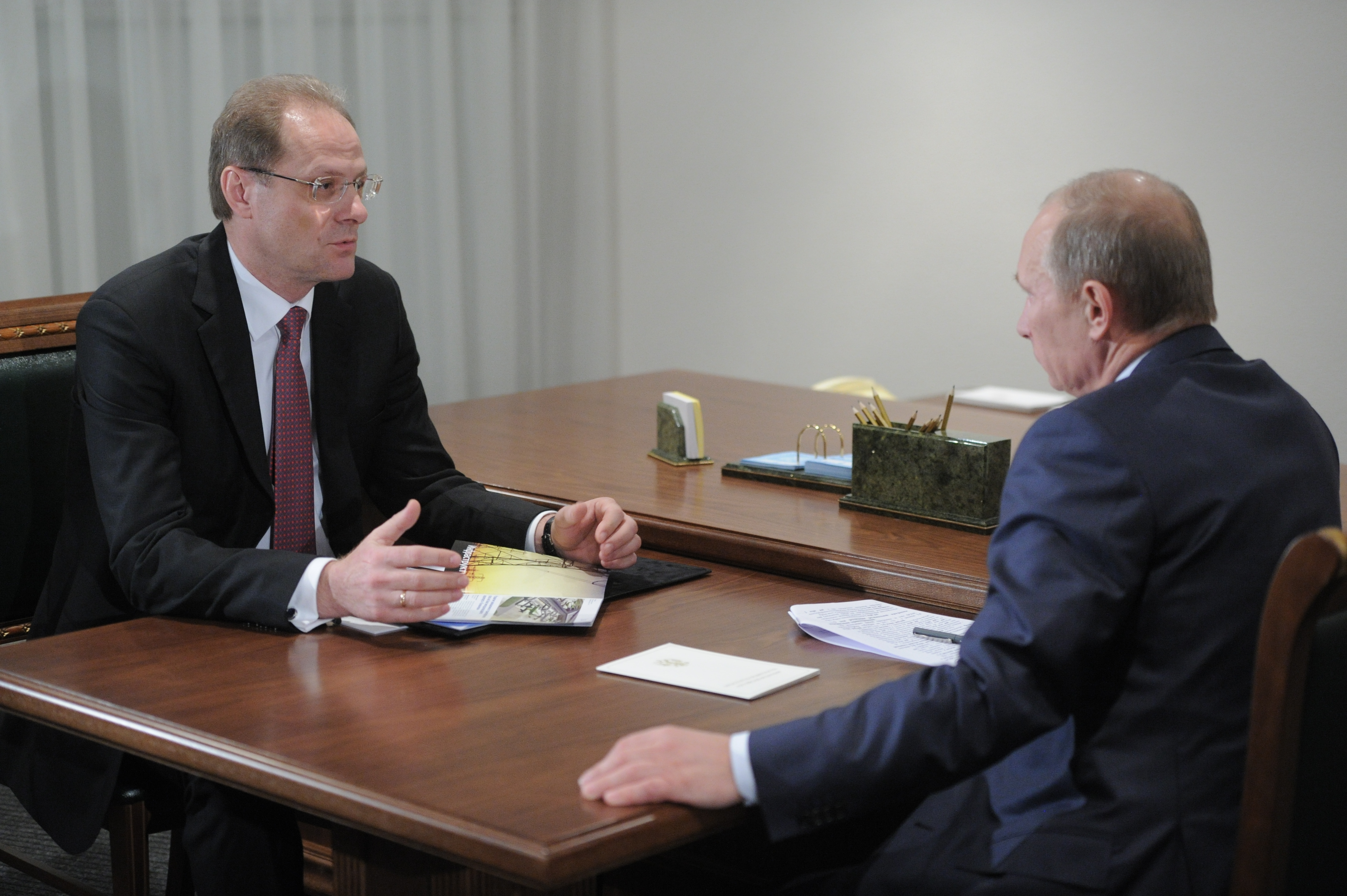 Рабочая встреча Председателя Правительства РФ Владимира Путина и губернатора Новосибирской области Василия Юрченко